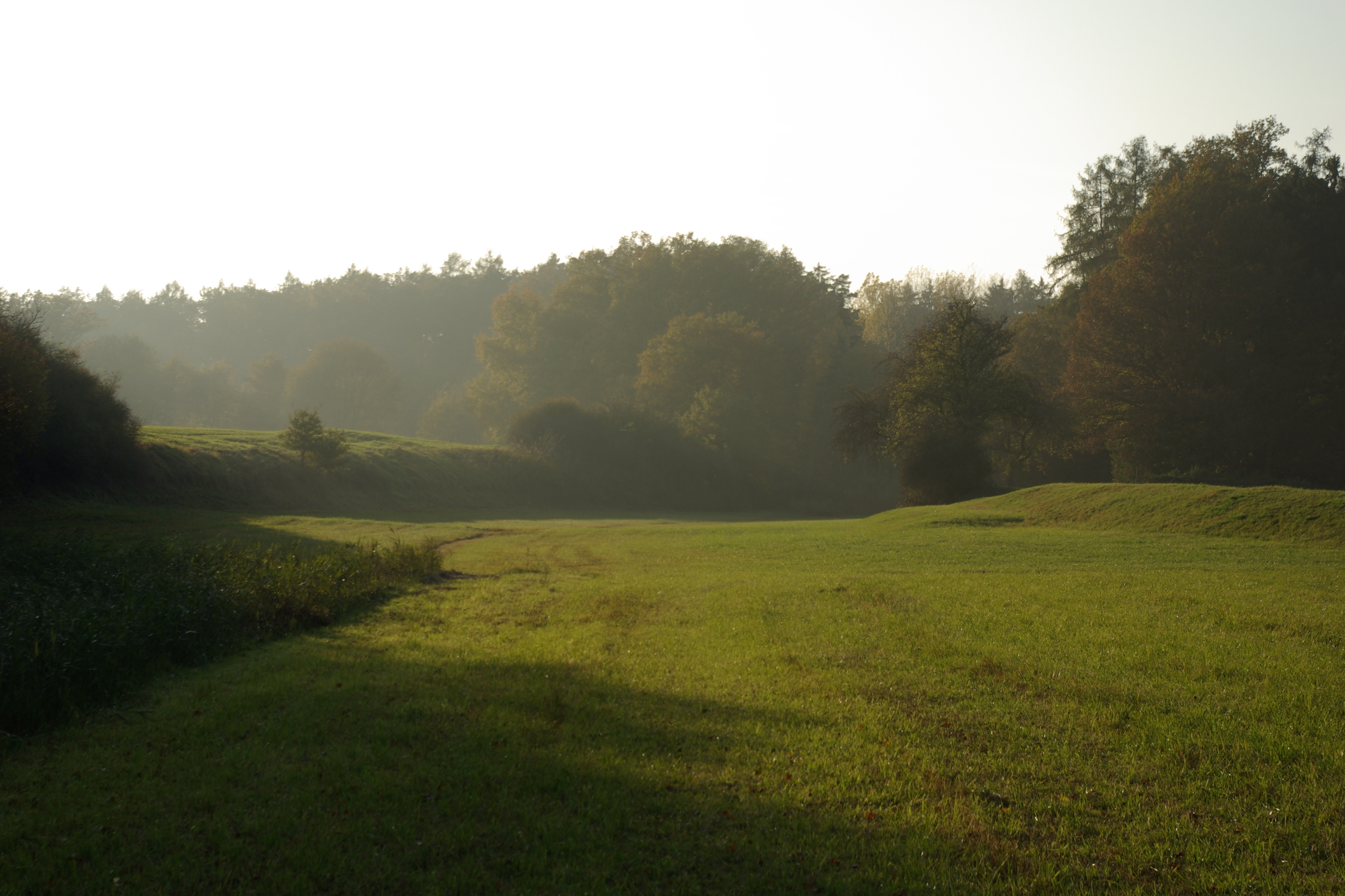 Fossa Carolina, nordöstlicher Abschnitt.